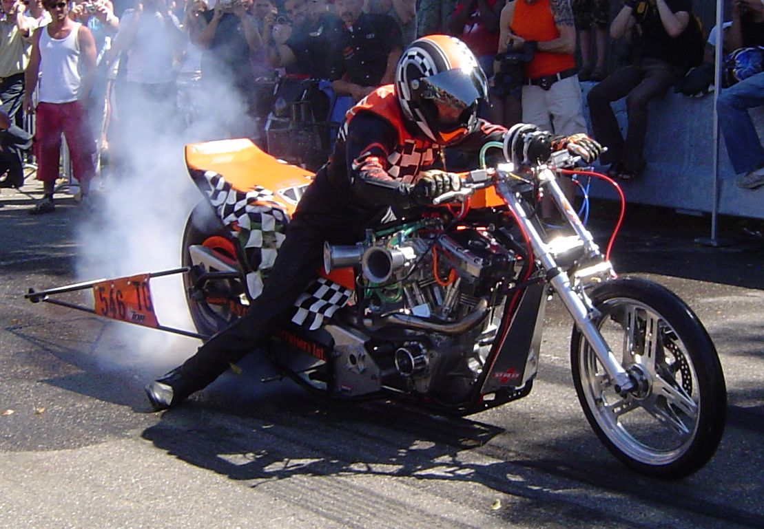 Rolling Burn out dragrace motorcycle